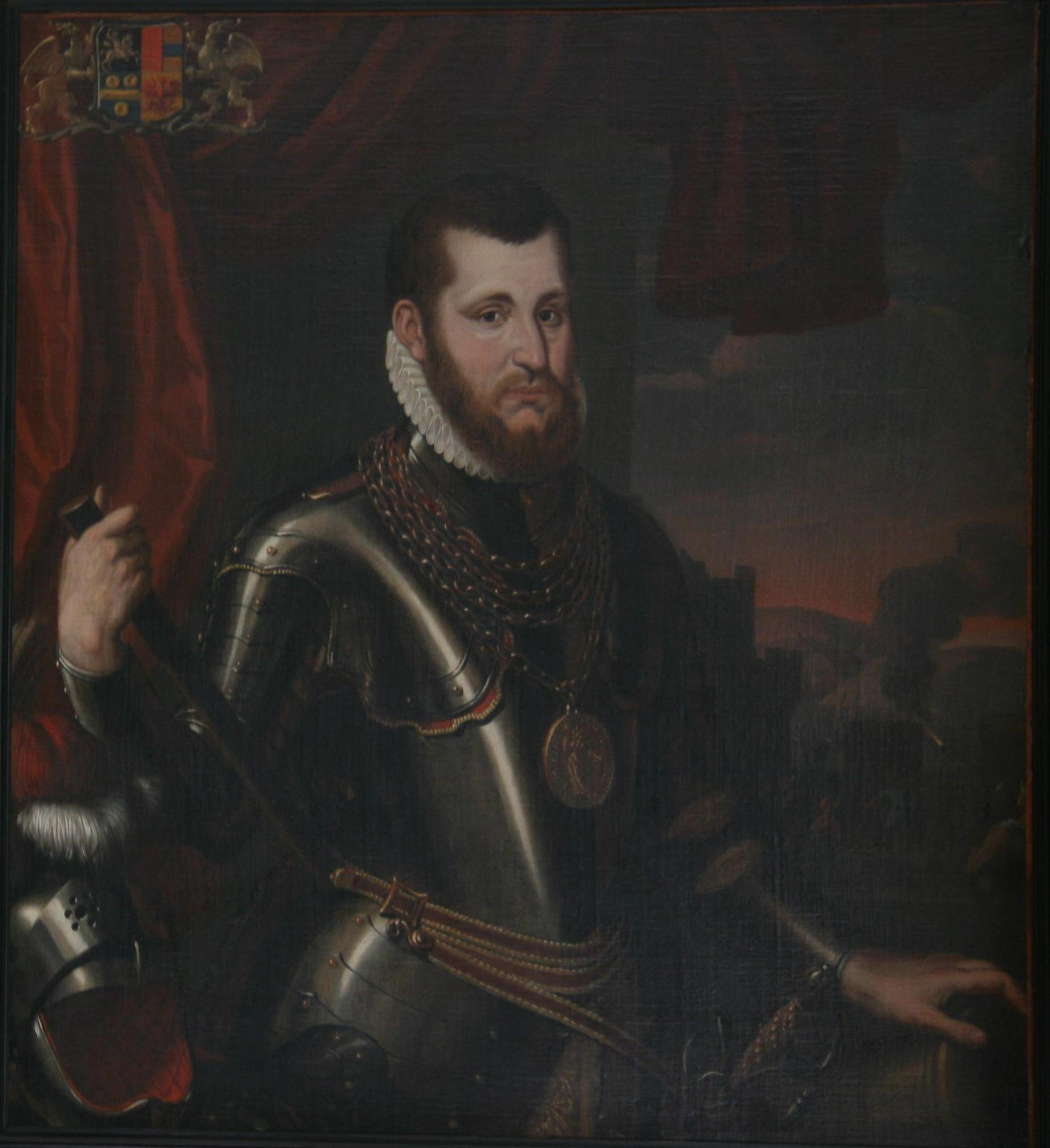 portret van Wigbolt Ripperda door de Menkemaborg toegeschreven aan Herman Collenius